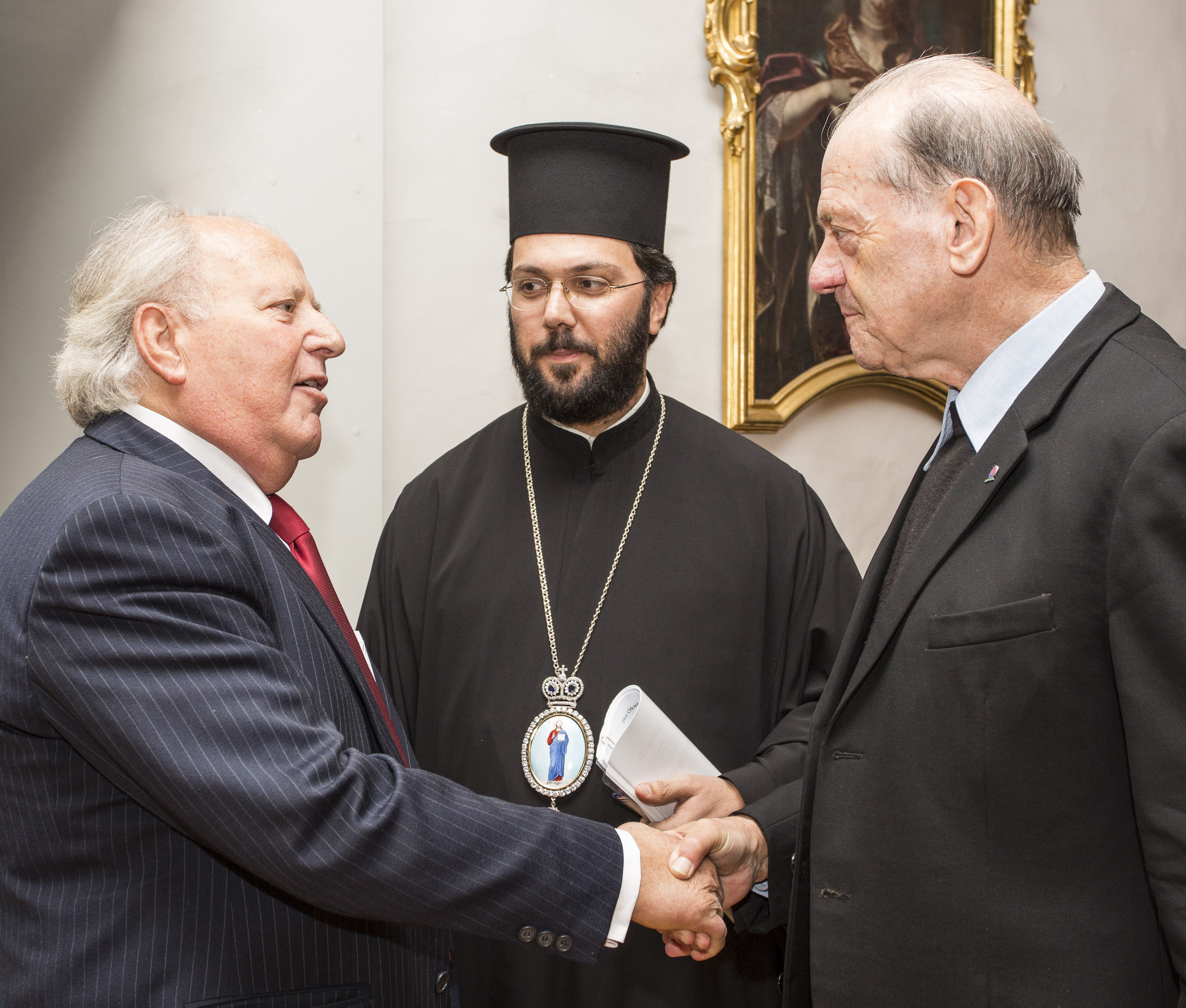 Univ.-Prof. Dr. Philipp Harnoncourt (im Bild rechts), Arsenios Kardamakis, griechisch-orthodoxer Metropolit von Austria (Bild Mitte), und Univ.-Prof. Dr. Grigorios Larentzakis (im Bild links), 21. November 2012